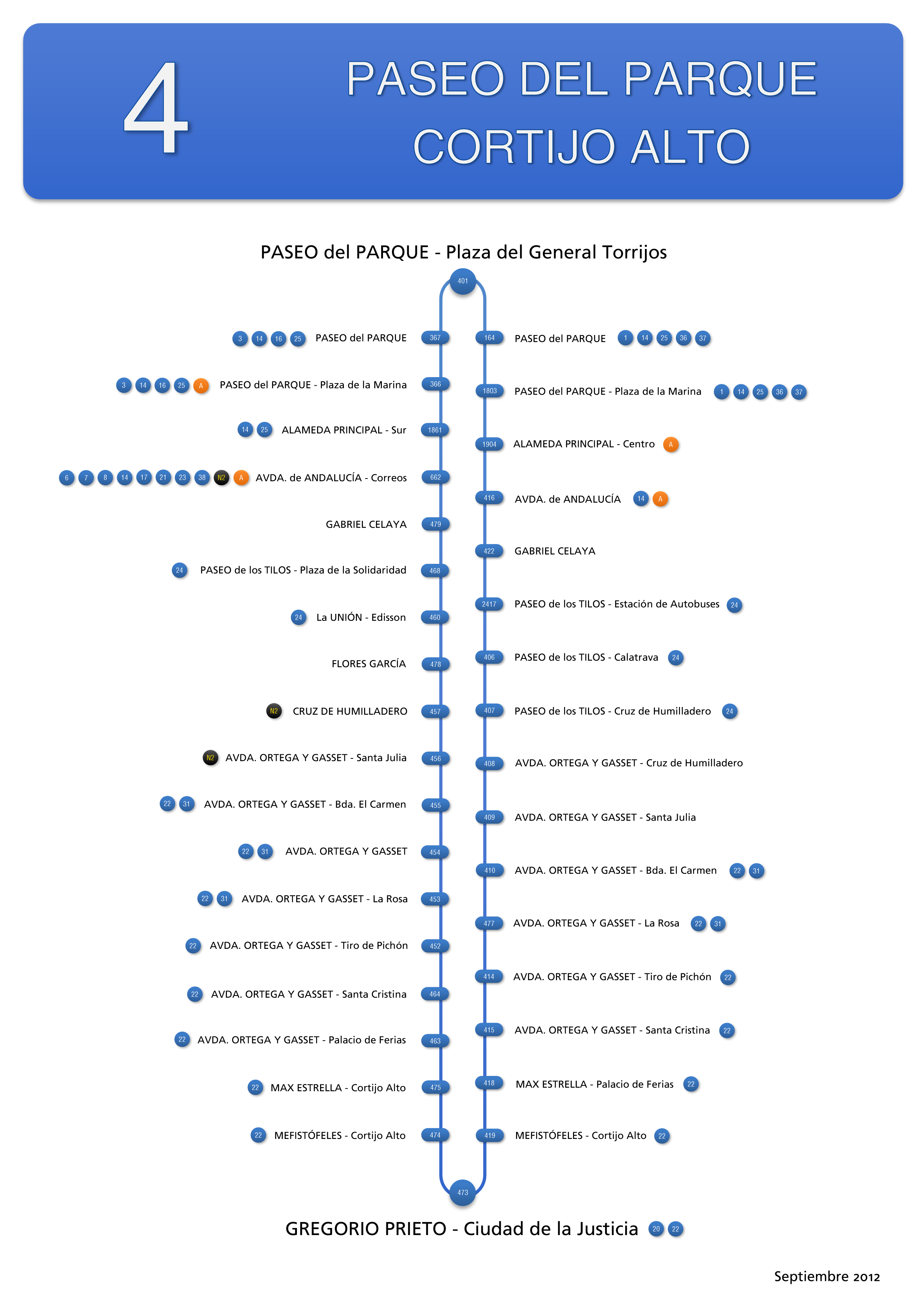 Itinerario de la línea 4